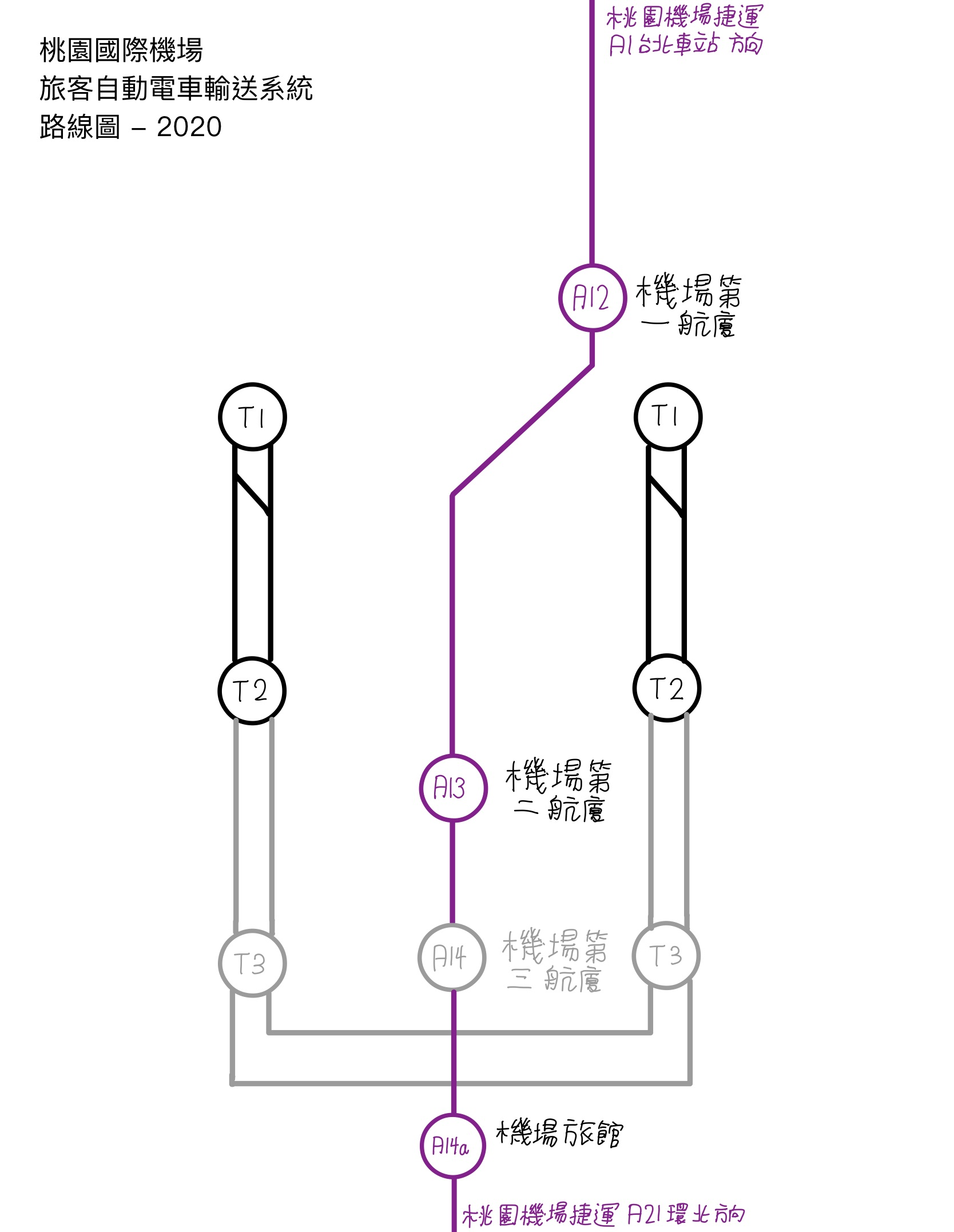 中文（台灣）: 桃園國際機場旅客自動電車輸送系統路線圖 - 2020